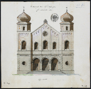 Bauplan der Synagoge in Gunzenhausen